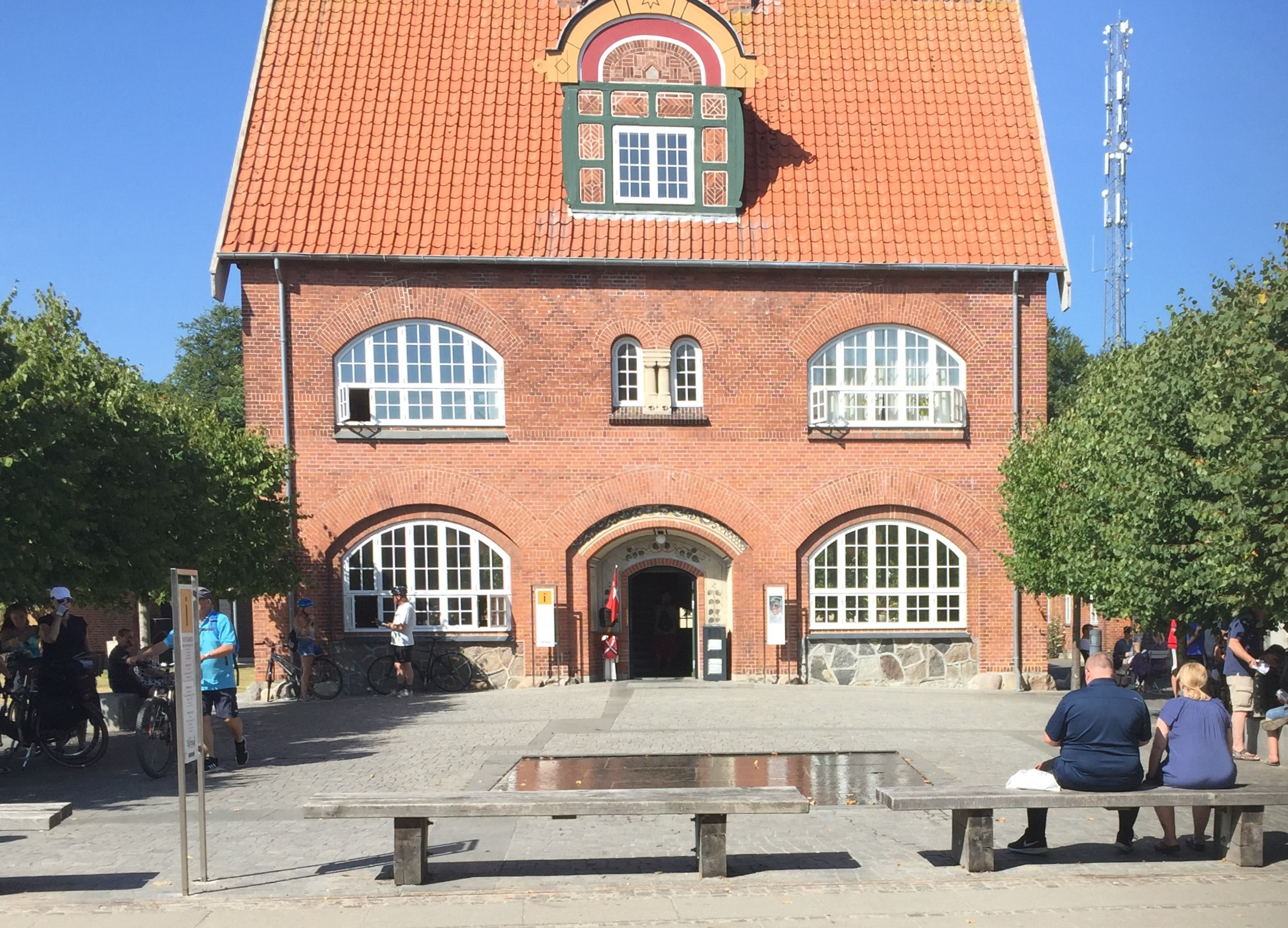 Samsø Kommunes rådhus 1962-2009, oprindeligt teknisk skole, nu bl.a. turistinformation